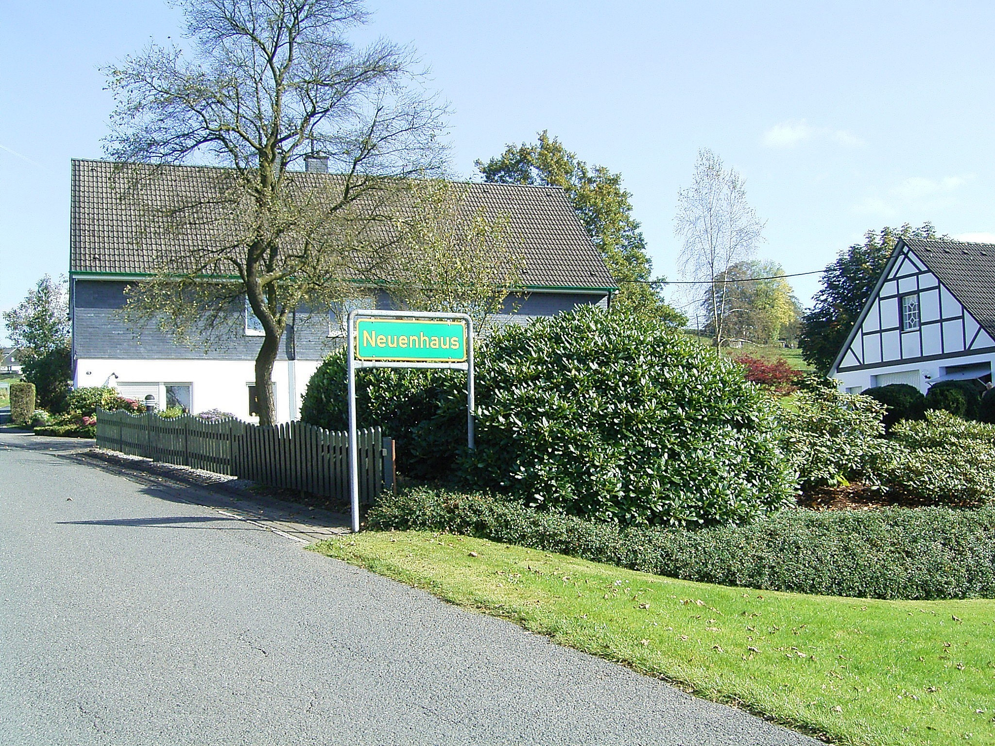 Radevormwald